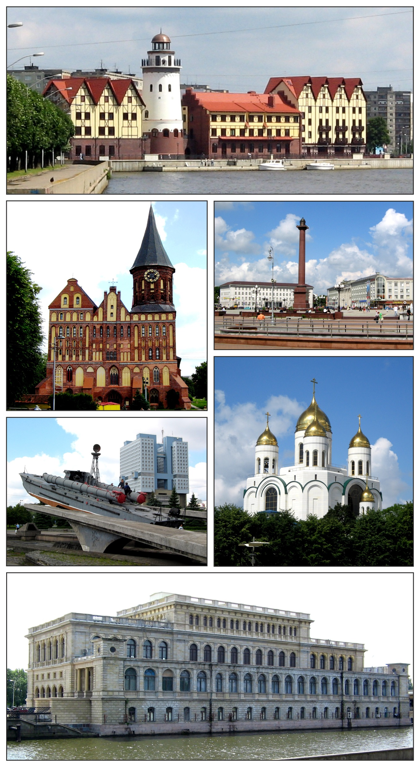 Коллаж из фотографий собственной съёмки.